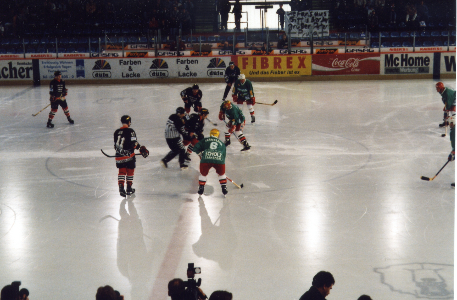 Nostalgie-Eishockeyspiel Berliner Schlittschuhclub - DDR All Stars im Berliner Sportforum, April 1997